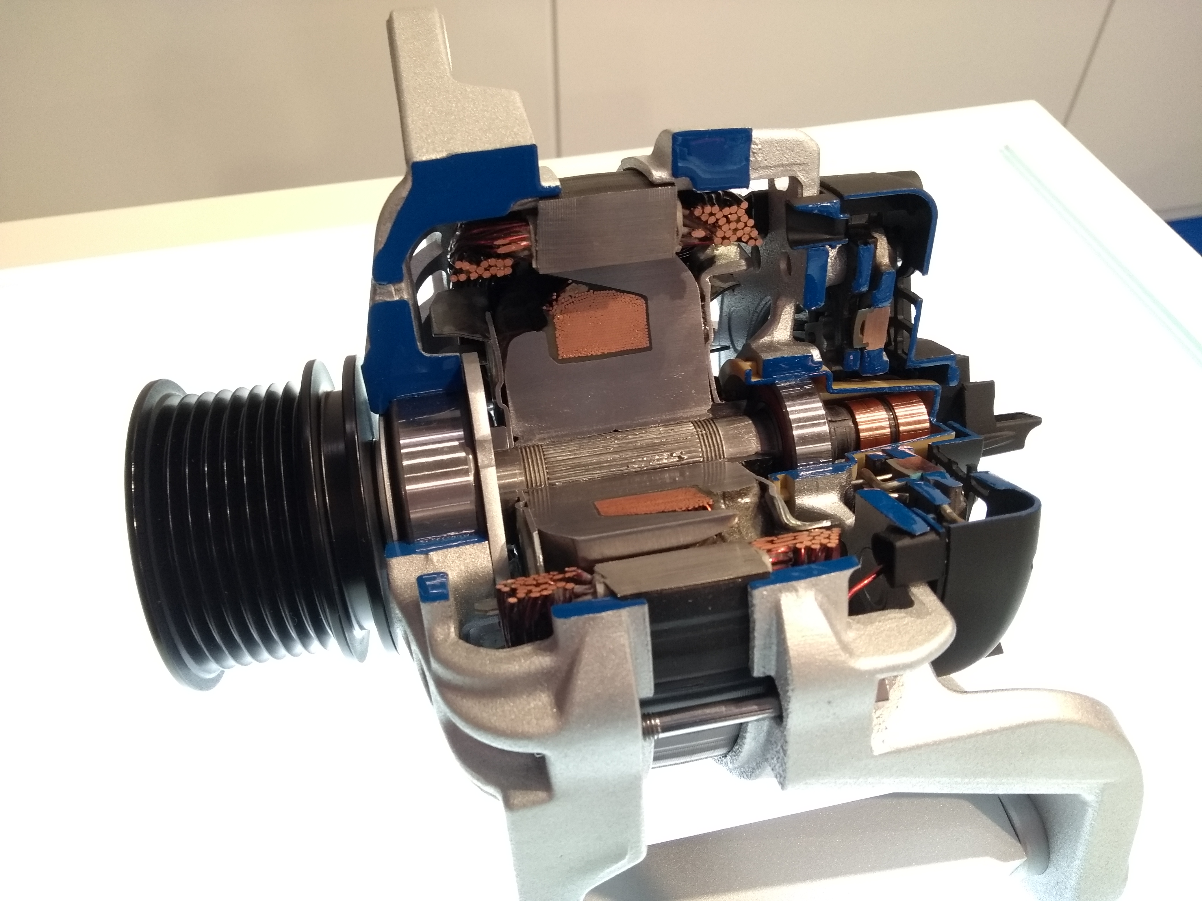 Schnittmodell Lichtmaschine IAA 2018